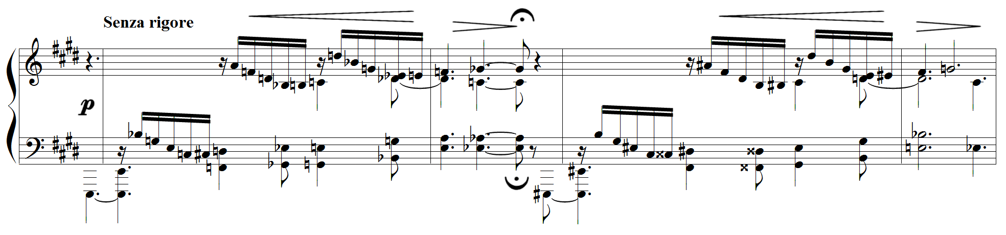 Quintette pour piano et cordes op.42 de Vierne, 2ème mouvement, mes.140-143